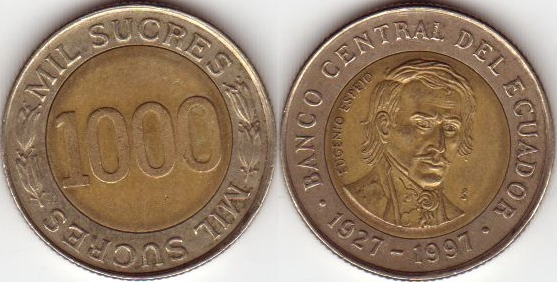 Ecuadorian 1000 Sucres coin